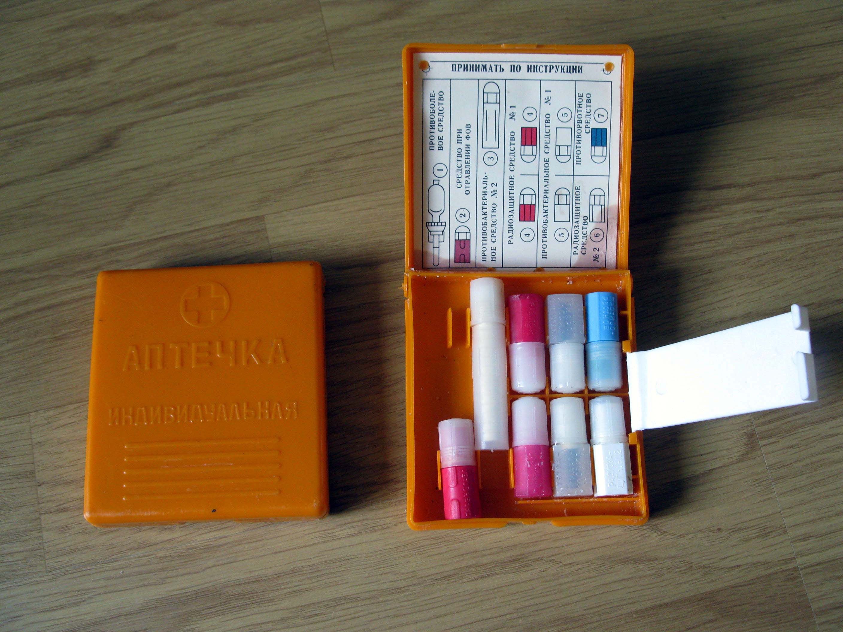 Общий вид и содержимое аптечки индивидуальной